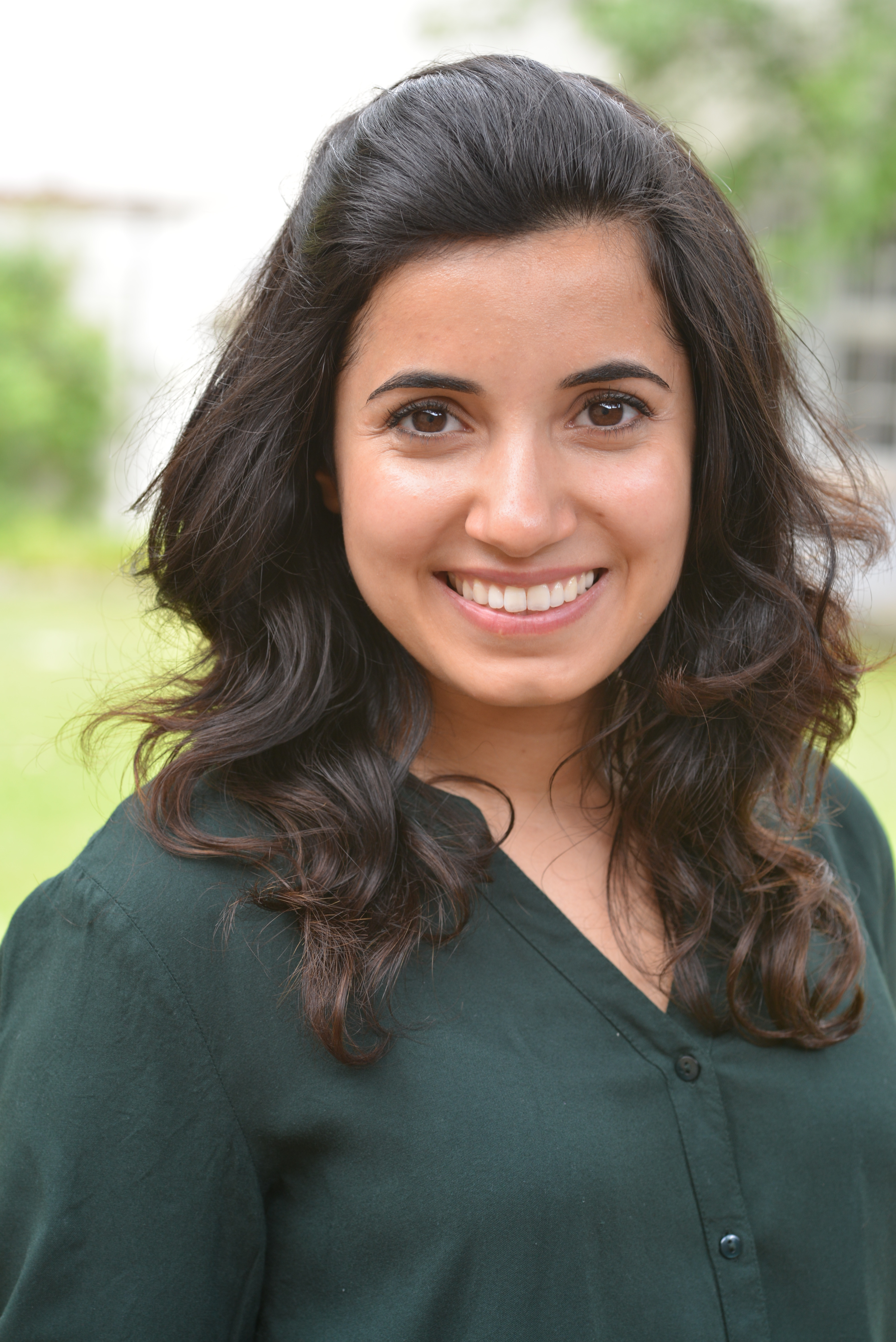 Misbah Khan im Freien